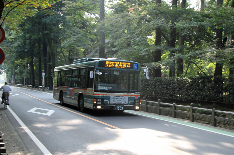 Seibu Bus route "Hibari 73" 西武バス ひばり73系統